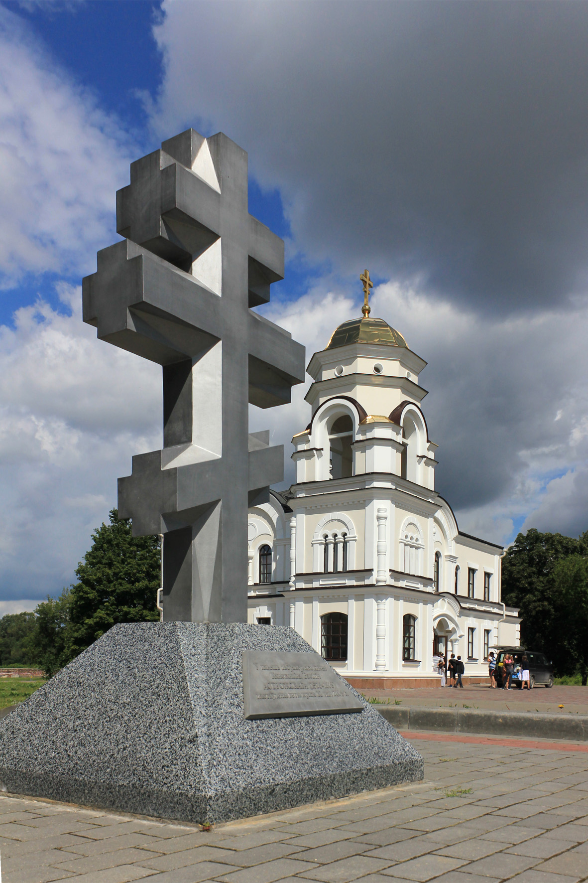 Памятный крест в память князя Константина-Василия Острожского, Беларусь, Брест, Брестская крепость